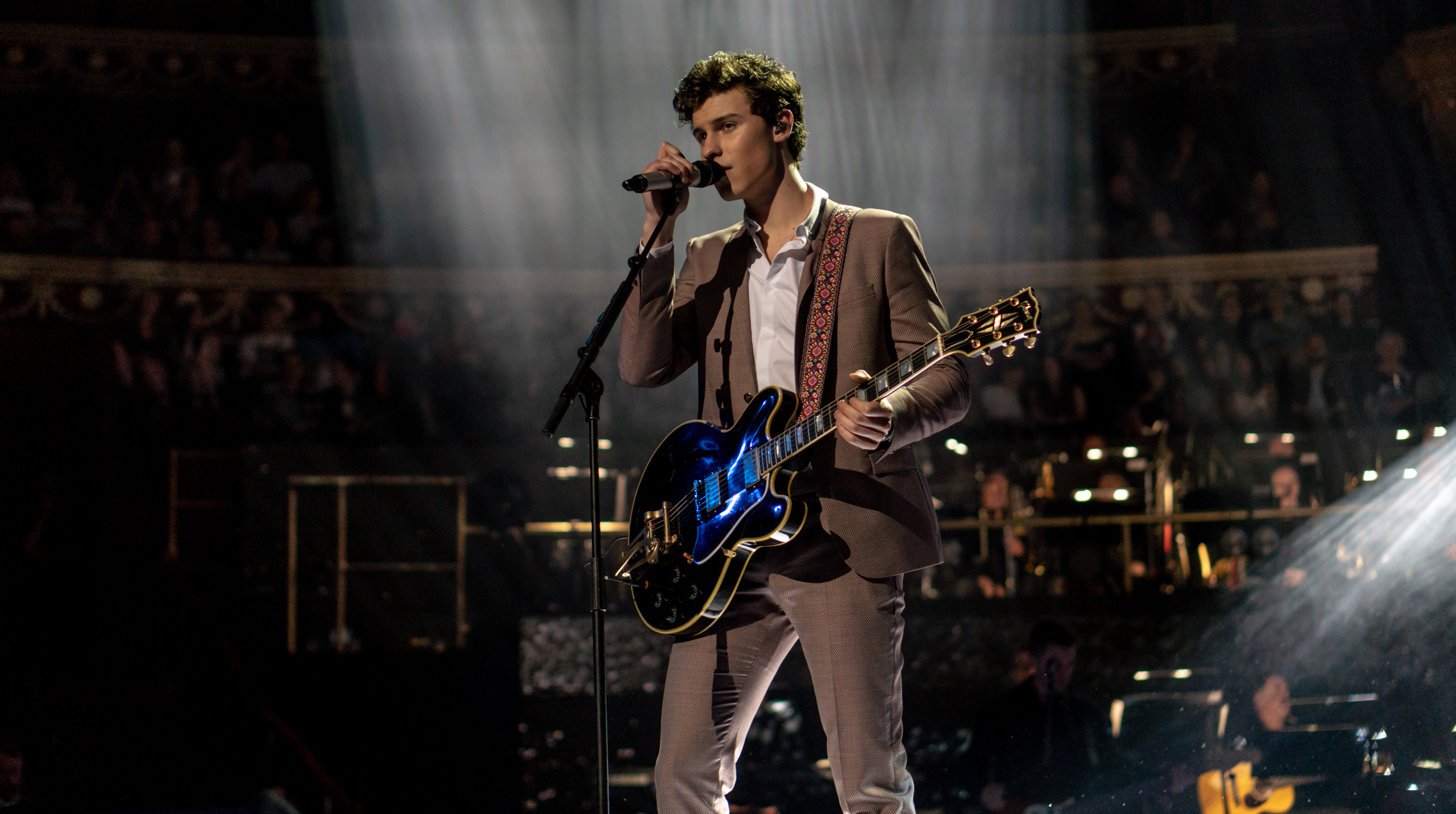 QueenbdayRAH210418-26